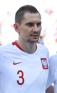 Artur Jędrzejczyk (3).